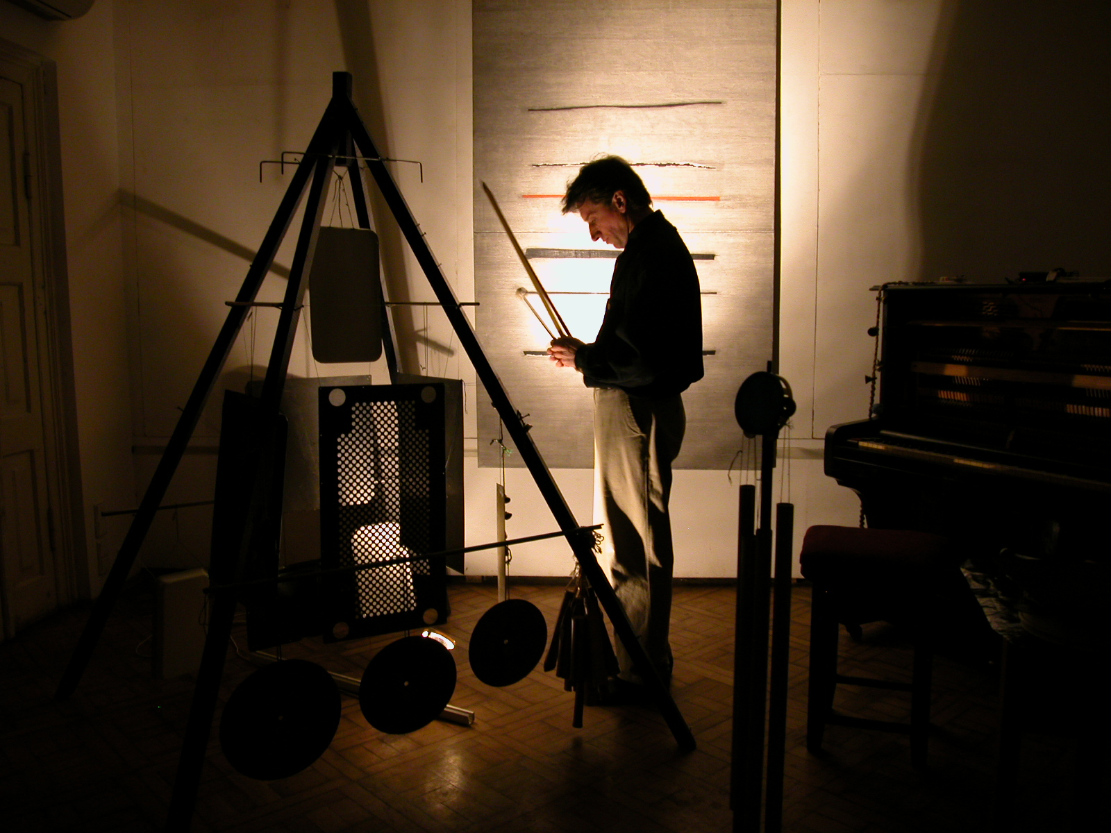 Аудіоперформанс Олександра Нестерова, 2003 рік